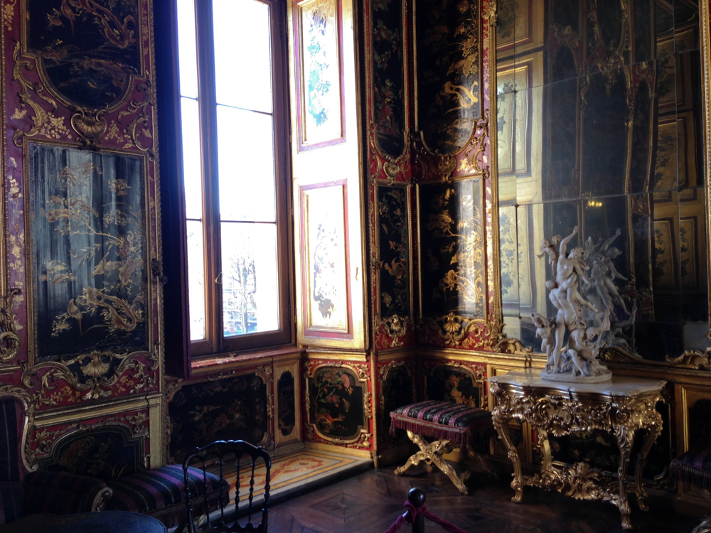 Cabinet chinois du Palais royal du Turin conçu par Filippo Juvarra